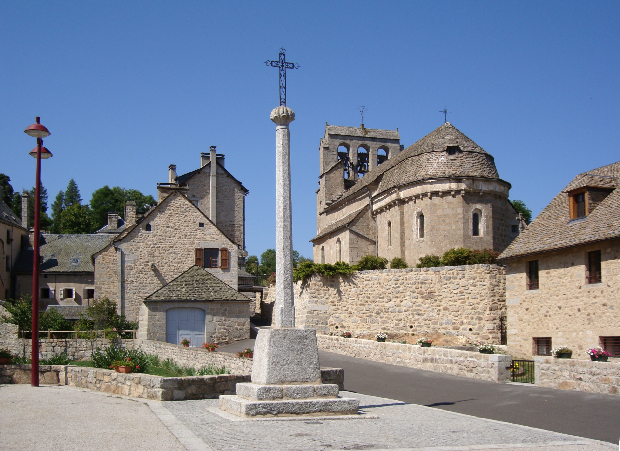 La place de Fournels en Lozère.